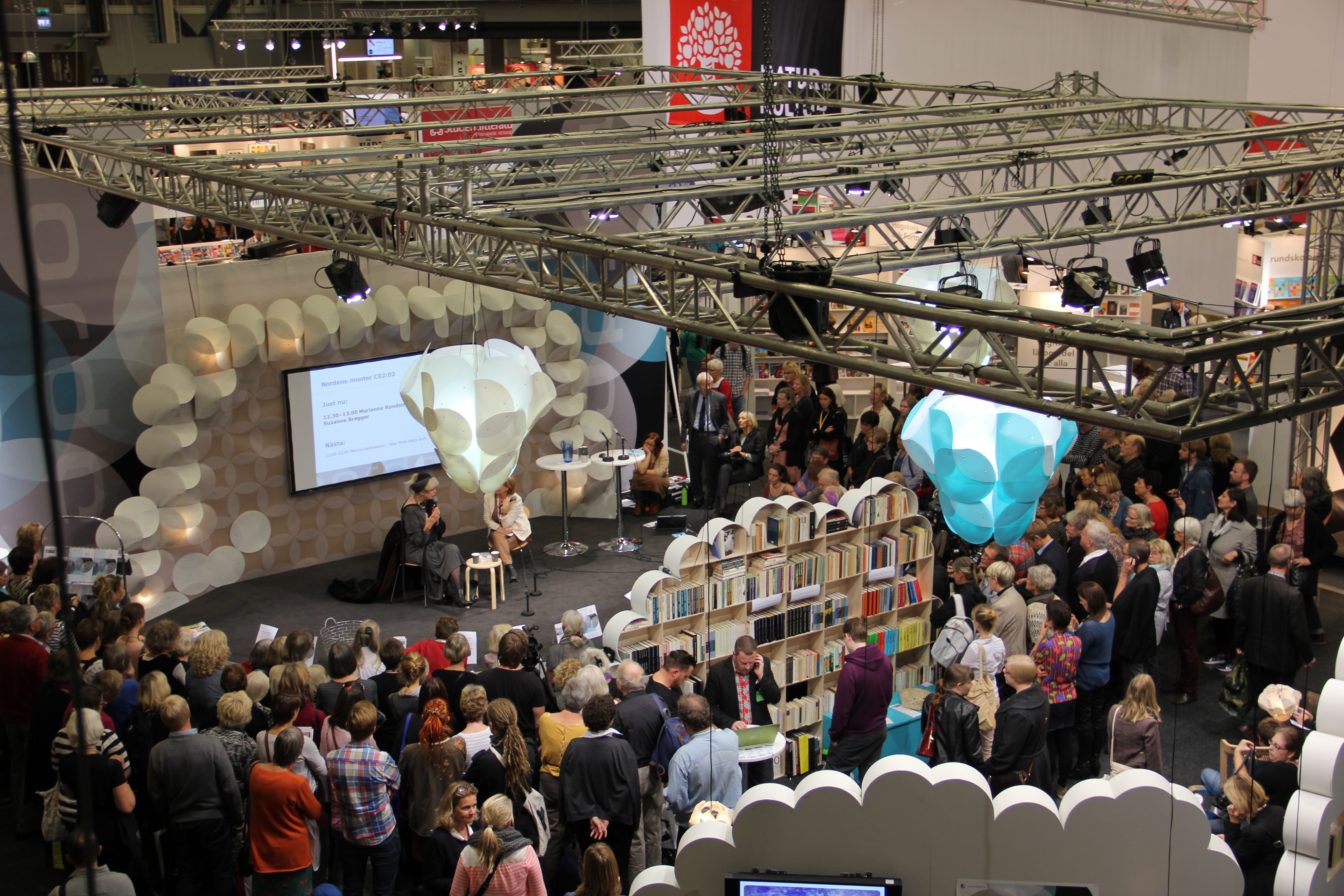 Nordens stand på bogmessen i Göteborg.